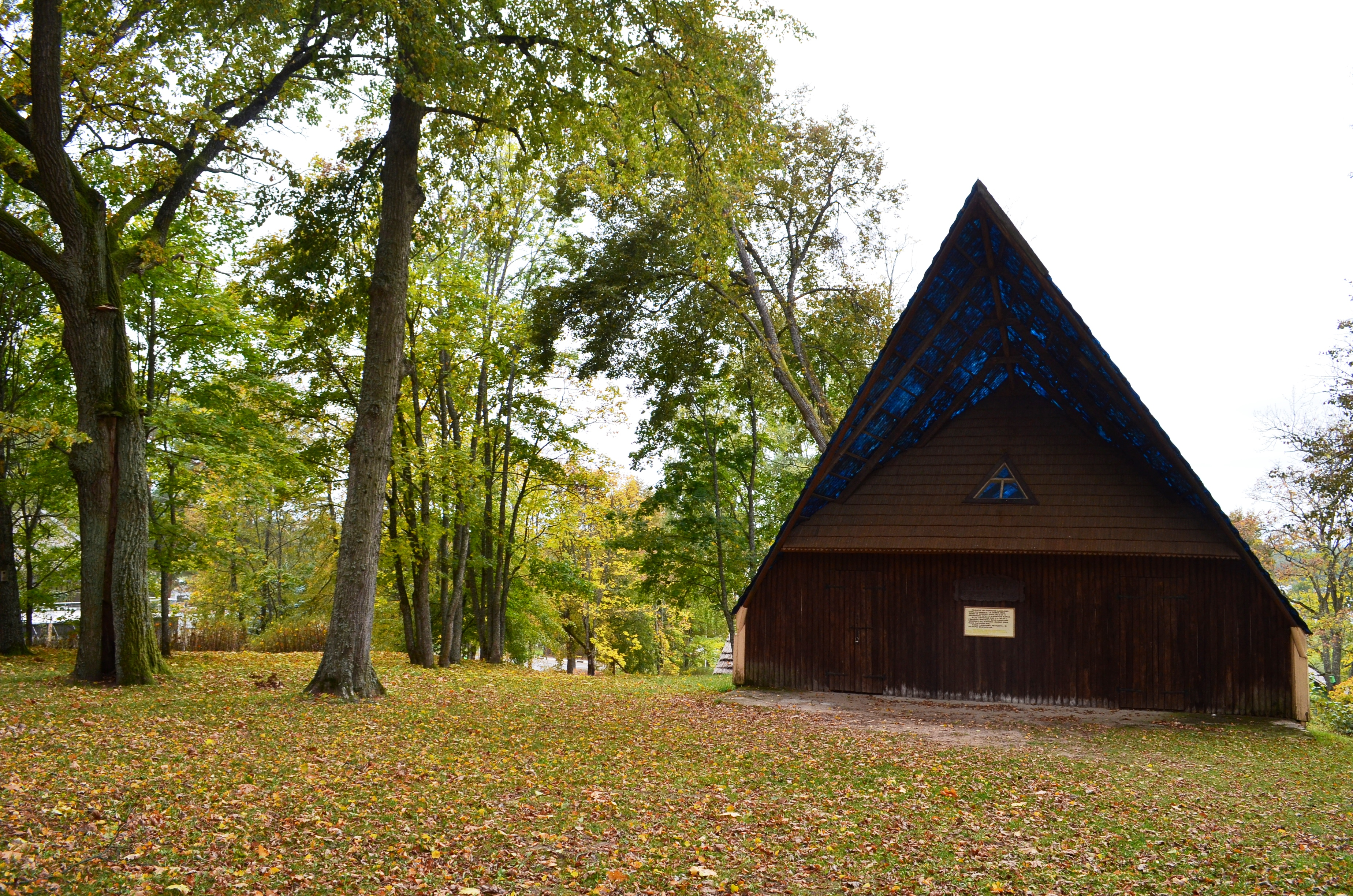 Palūšės pilkapis, Ignalinos raj.